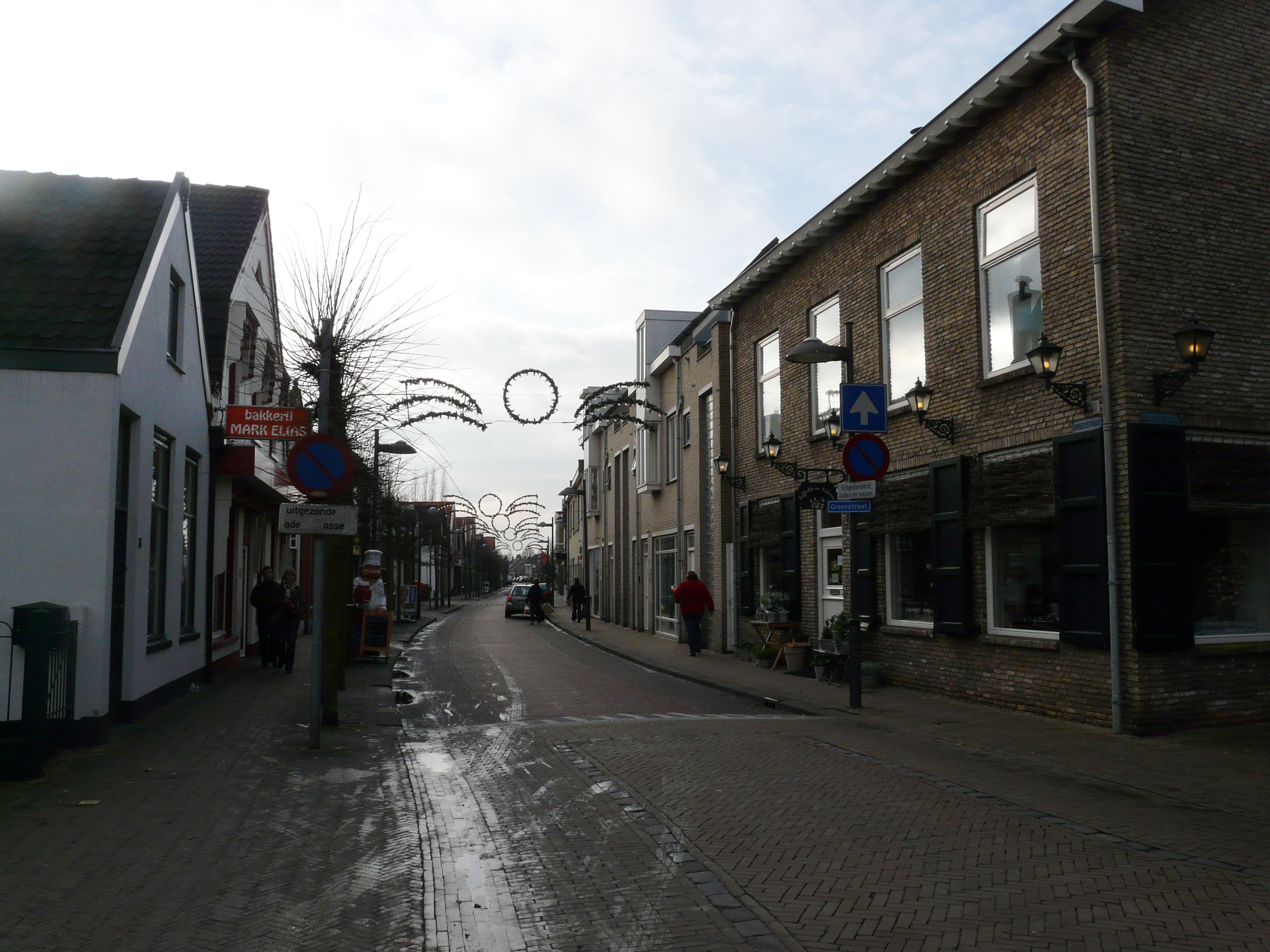 Zicht op het begin van de Groenstraat gelegen in het centrum van Prinsenbeek